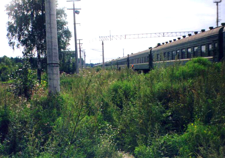 Longdistancaj vagonoj en stacio Svirj, Leningrada provinco, Rusio, 2003. Mi, aŭtoro de la bildo, permesas al ĉiuj uzi ĝin kun ĉi tiuj kondiĉoj: La fonta bildo de ĉi tiu bildo estas ankaŭ en mia propra retpaĝaro [1]